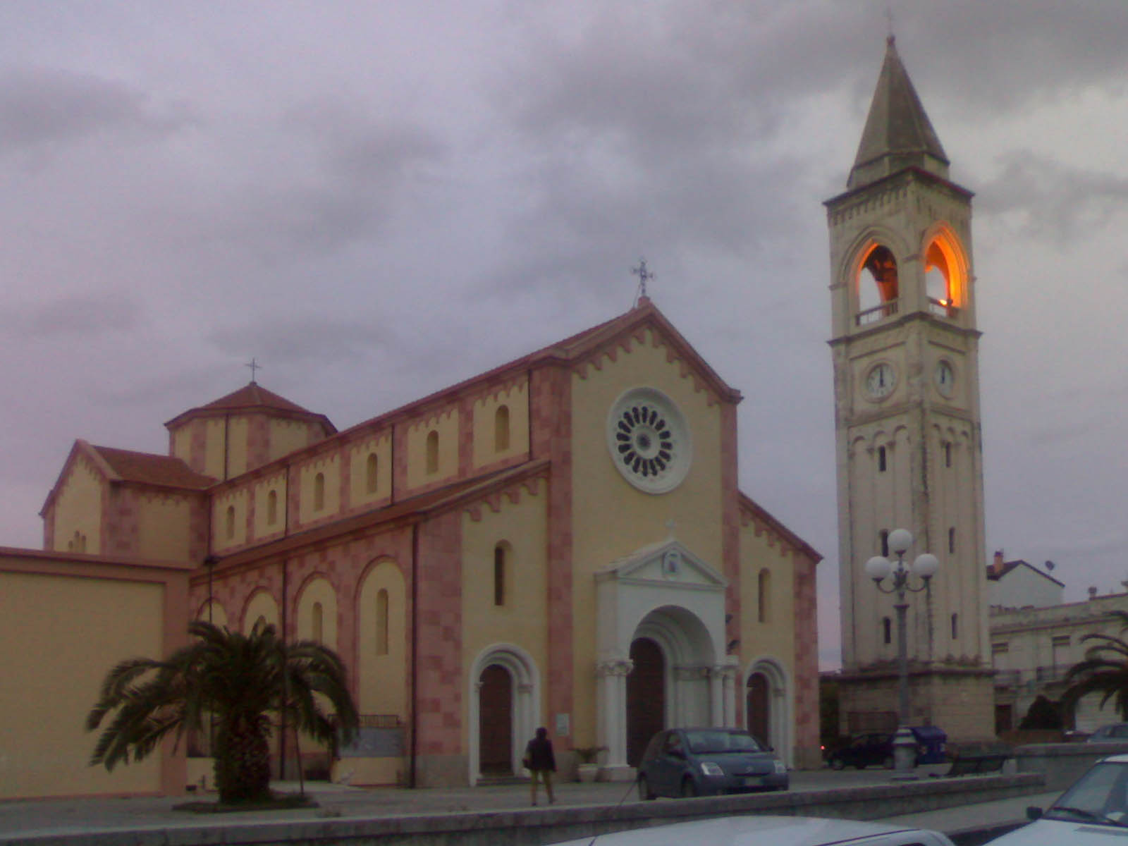 Concattedrale di Palmi (RC) intitolata a San Nicola vescovo